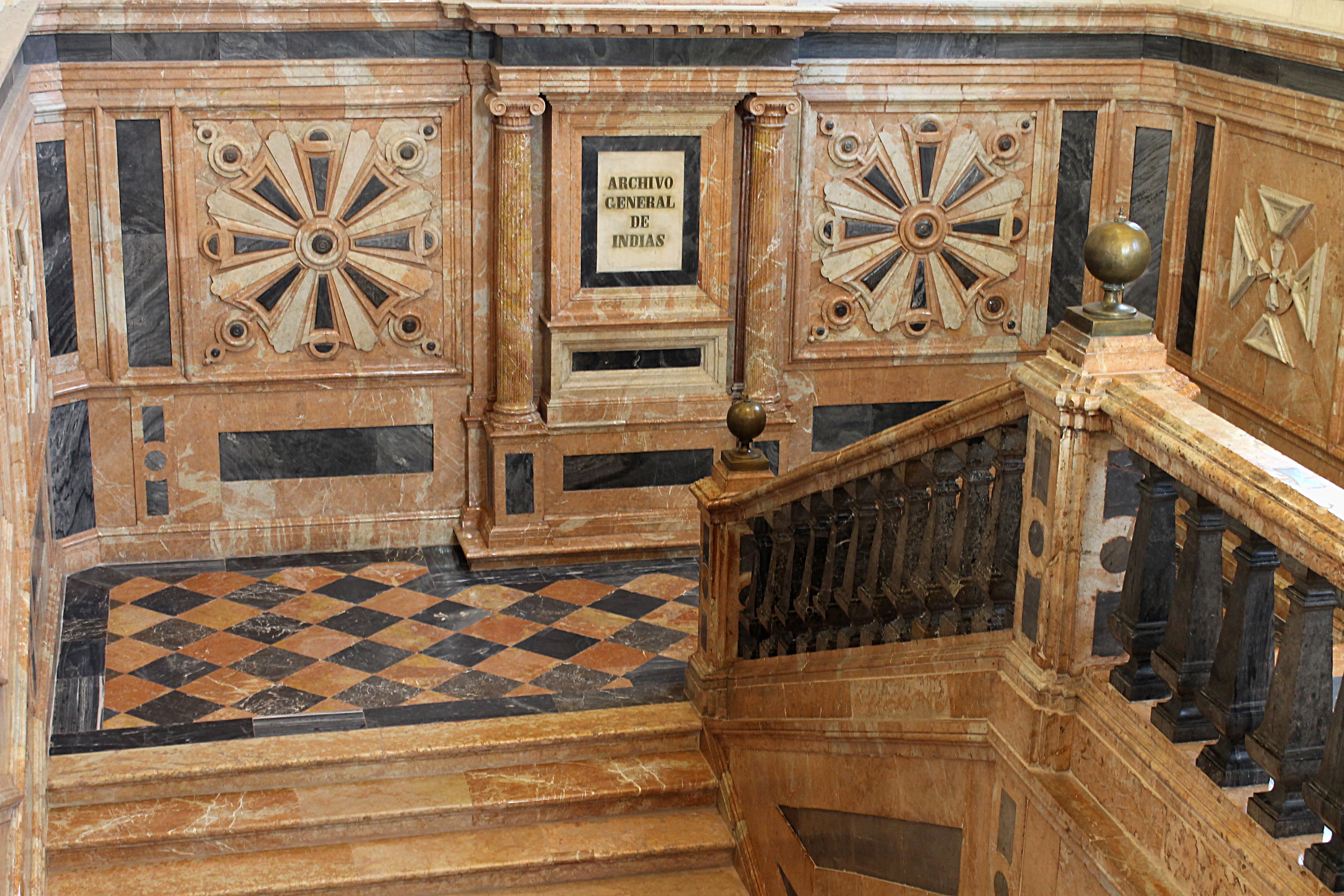 Archives Générales des Indes. L'ancienne Bourse Renaissance fut construite en 1572 et prit sa fonction actuelle d'Archives Générales des Indes en 1785. Elle rassemble dans sa bibliothèque toute la documentation sur la colonisation du Nouveau Monde par l'Espagne.